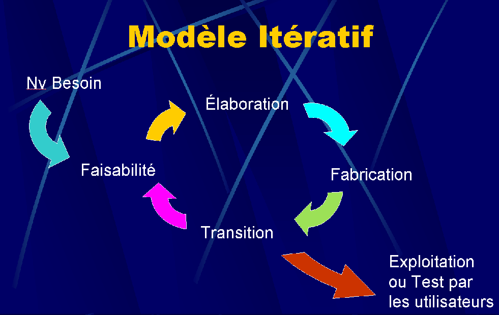 Les différentes étapes du développement en cascade